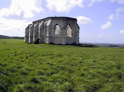 Guemy la chapelle Saint Louis